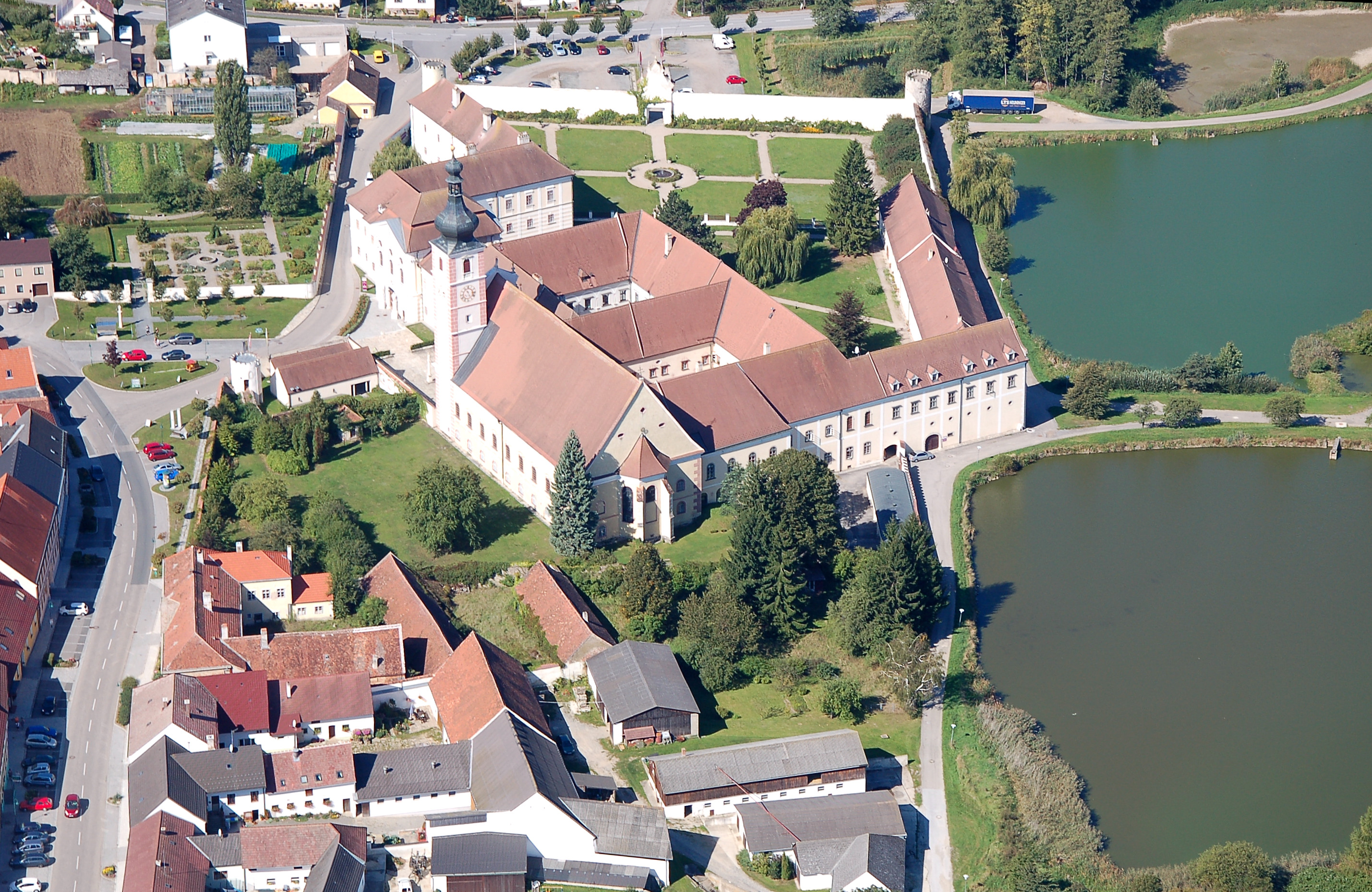 Gesamtanlage Stift Geras